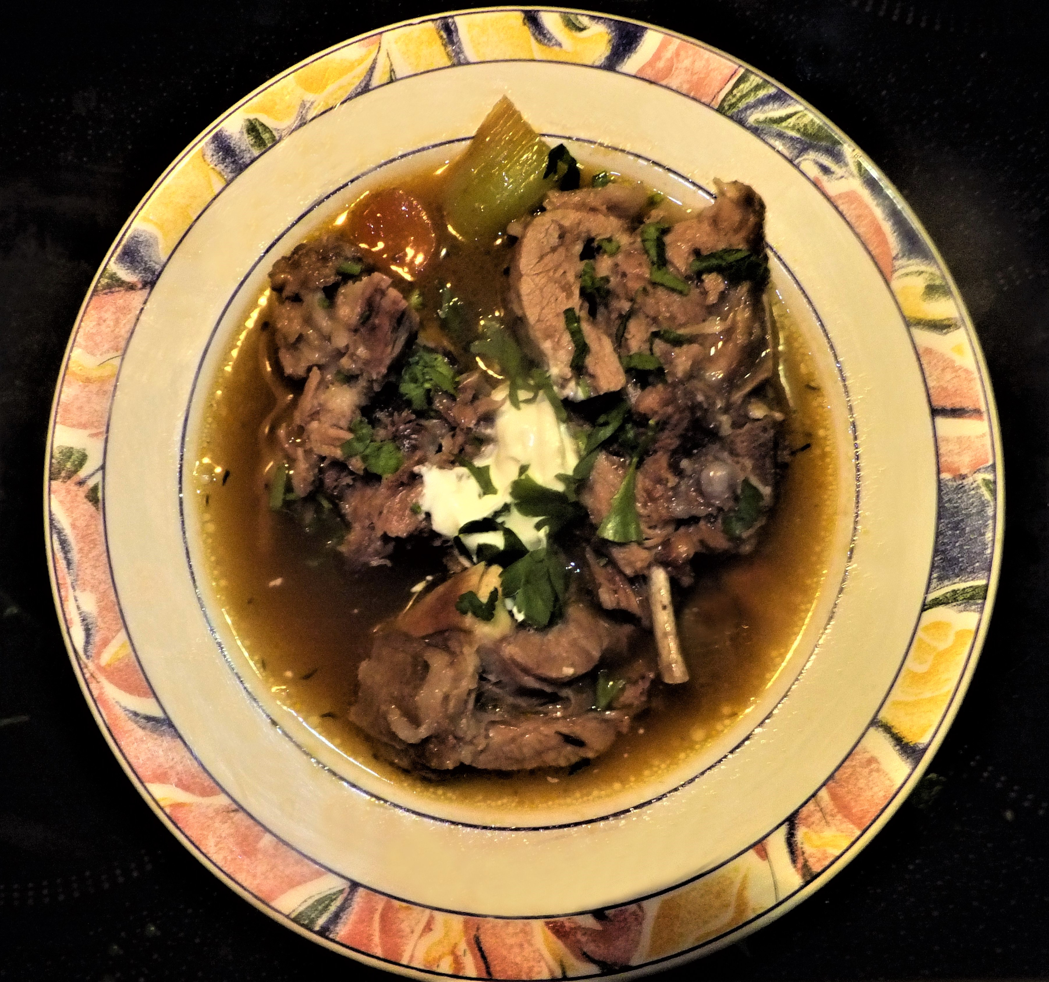 Ciorbă de miel - Säuerliche Lammsuppe, wird gerne zu Ostern gegessen